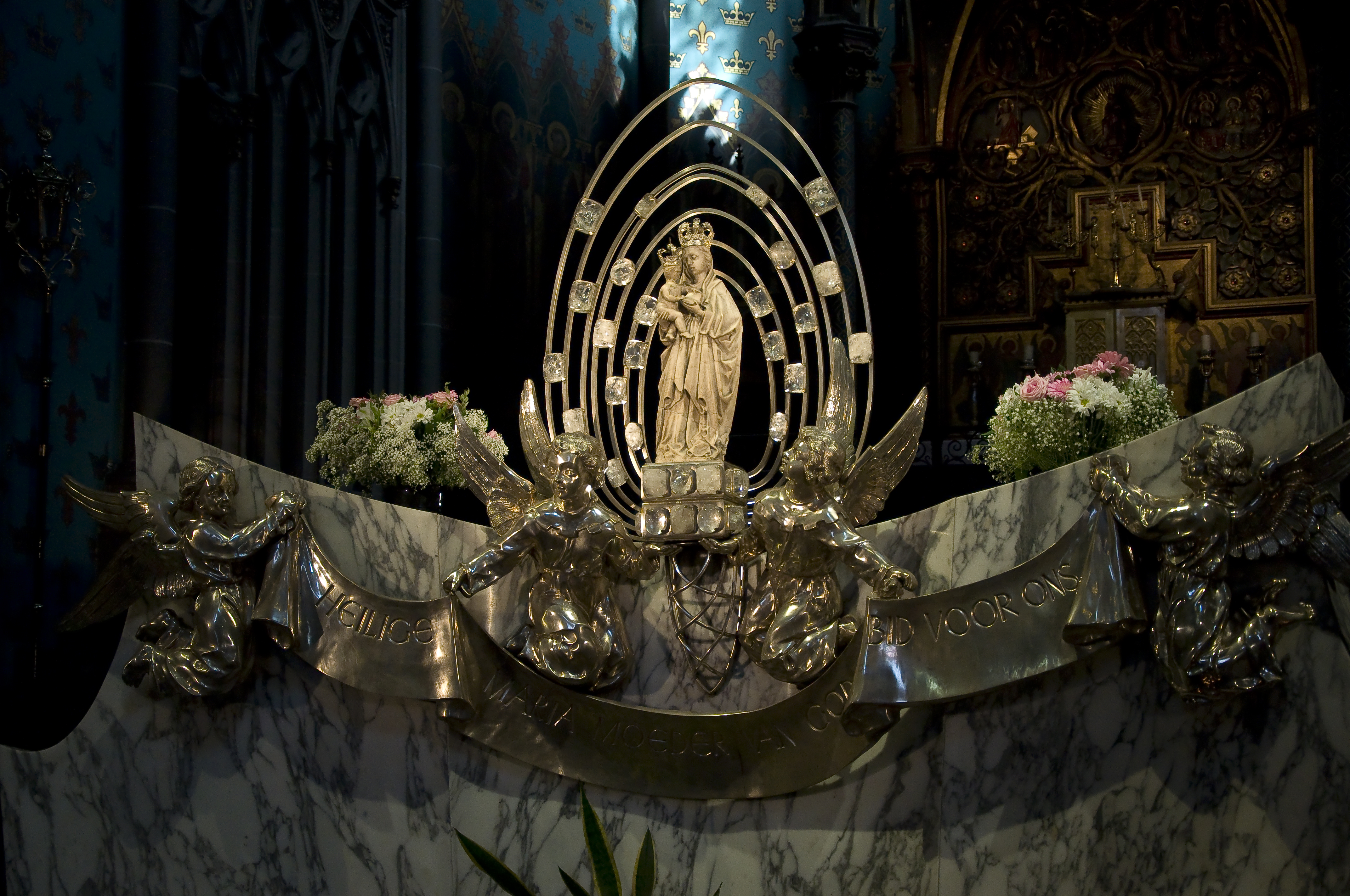 Het beeld van Onze-Lieve-Vrouw van Dadizele in de basiliek te Dadizele, België